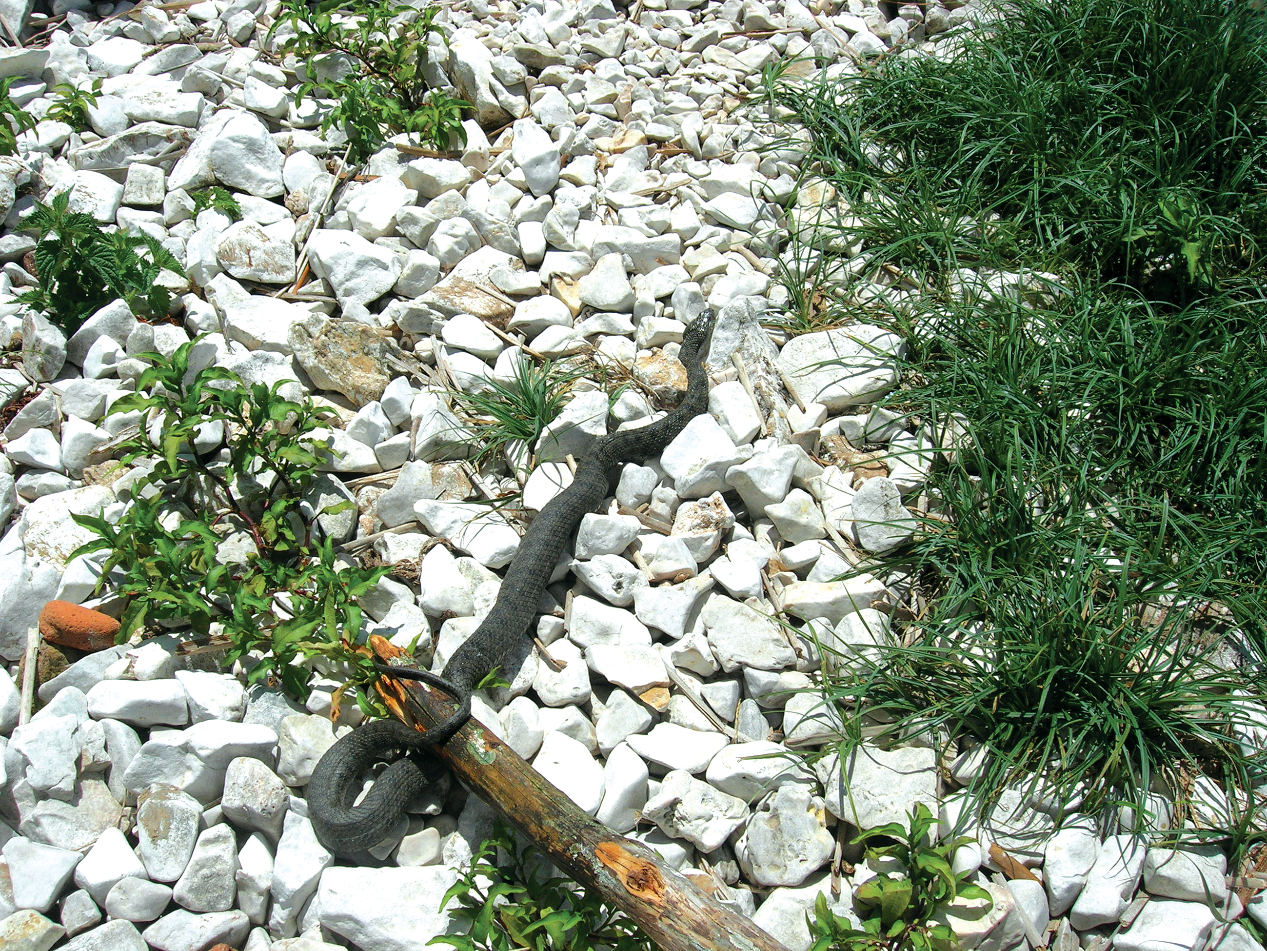 Natrix tessellata - Island Golem Grad. Prespa, Macedonia